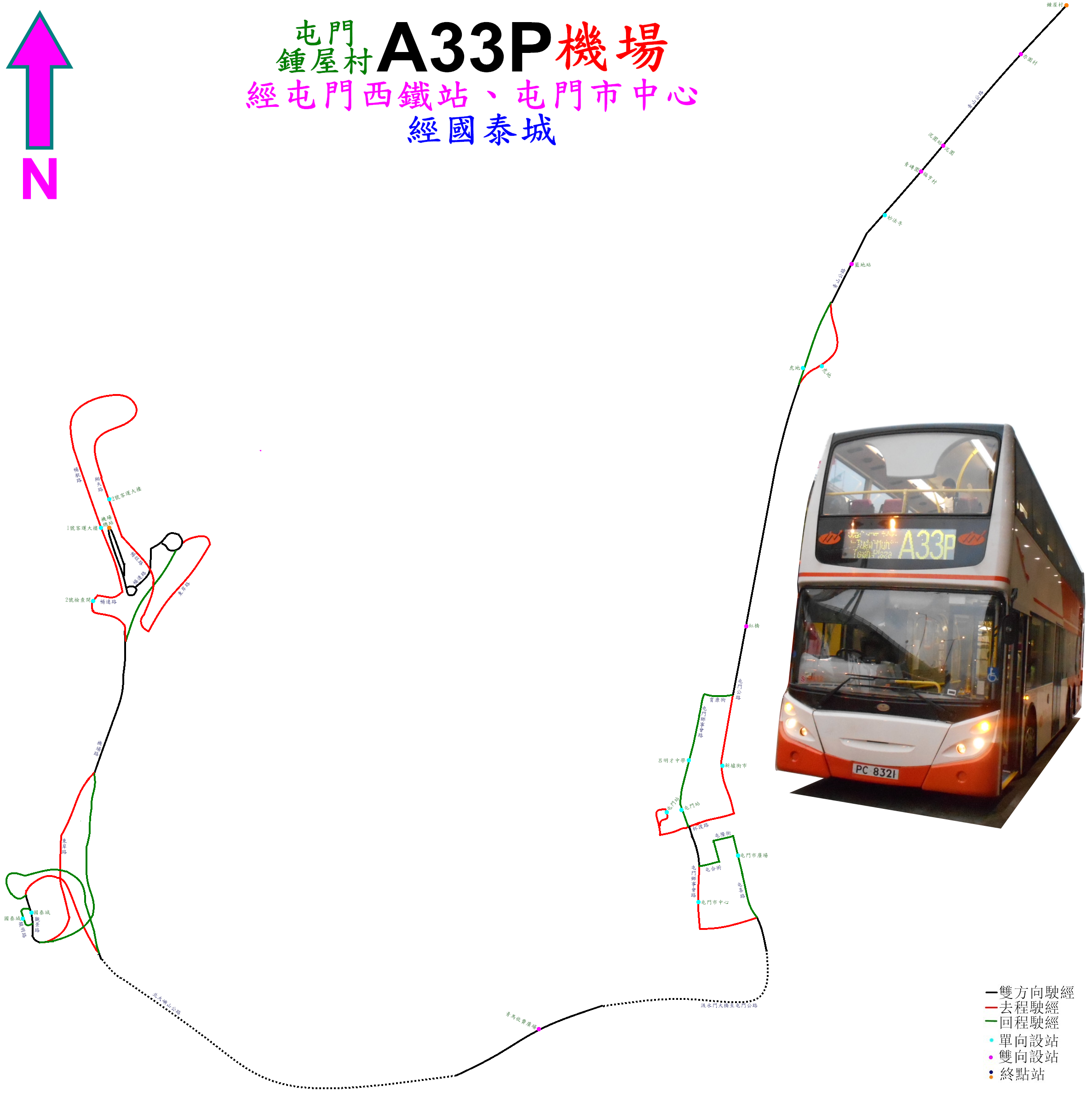 中文（香港）: 龍運巴士A33P線的走線圖